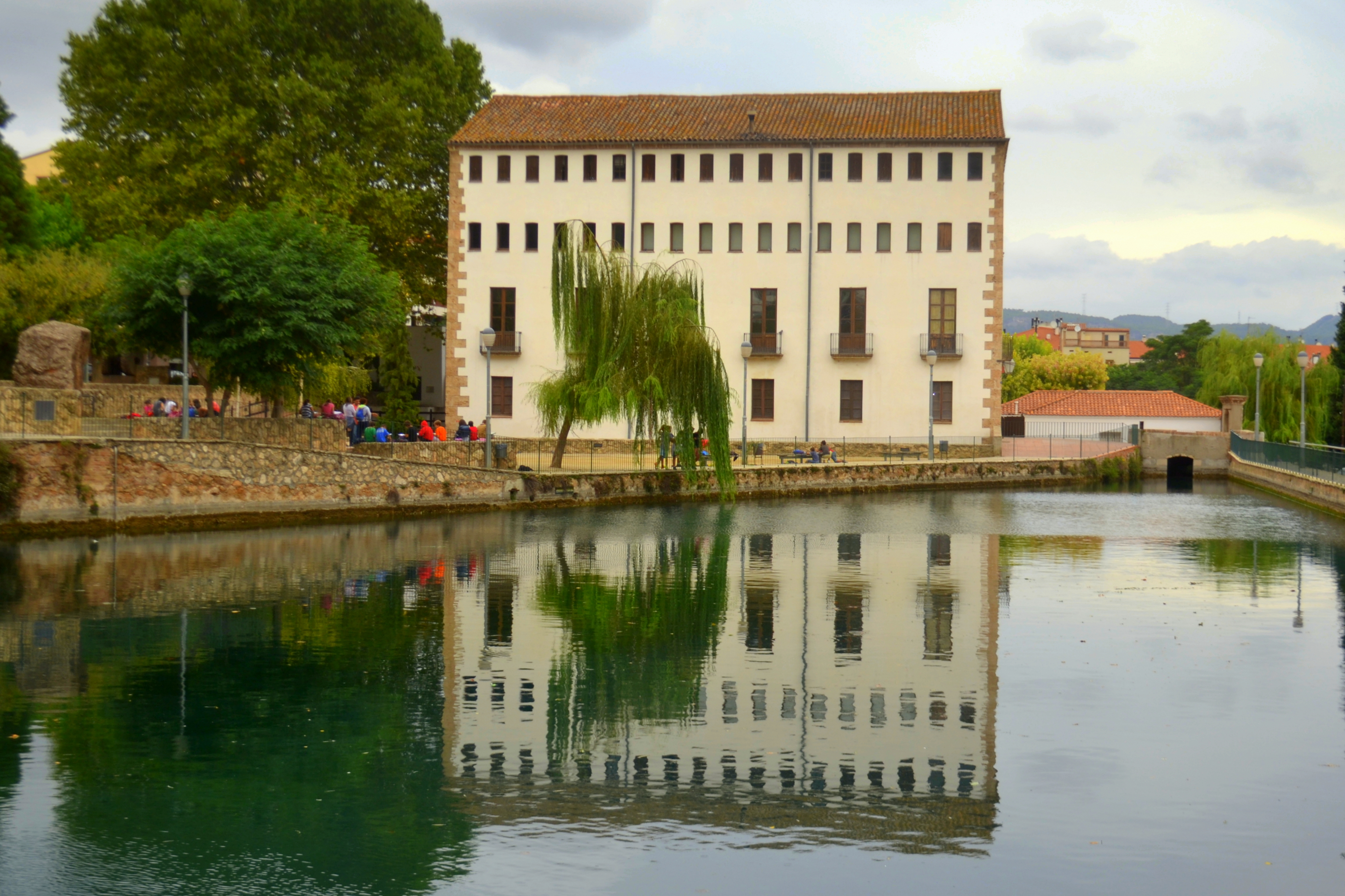 Bassa Gran i Font Petita (Capellades)